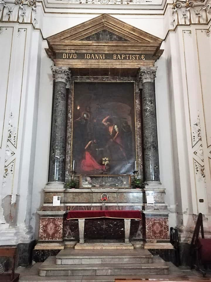 Cappella di San Giovanni Battista. Dipinto Decapitazione del Battista opera dei fratelli Vaccaro Caltagirone 1856. Urna contenente i resti di San Sinforo.